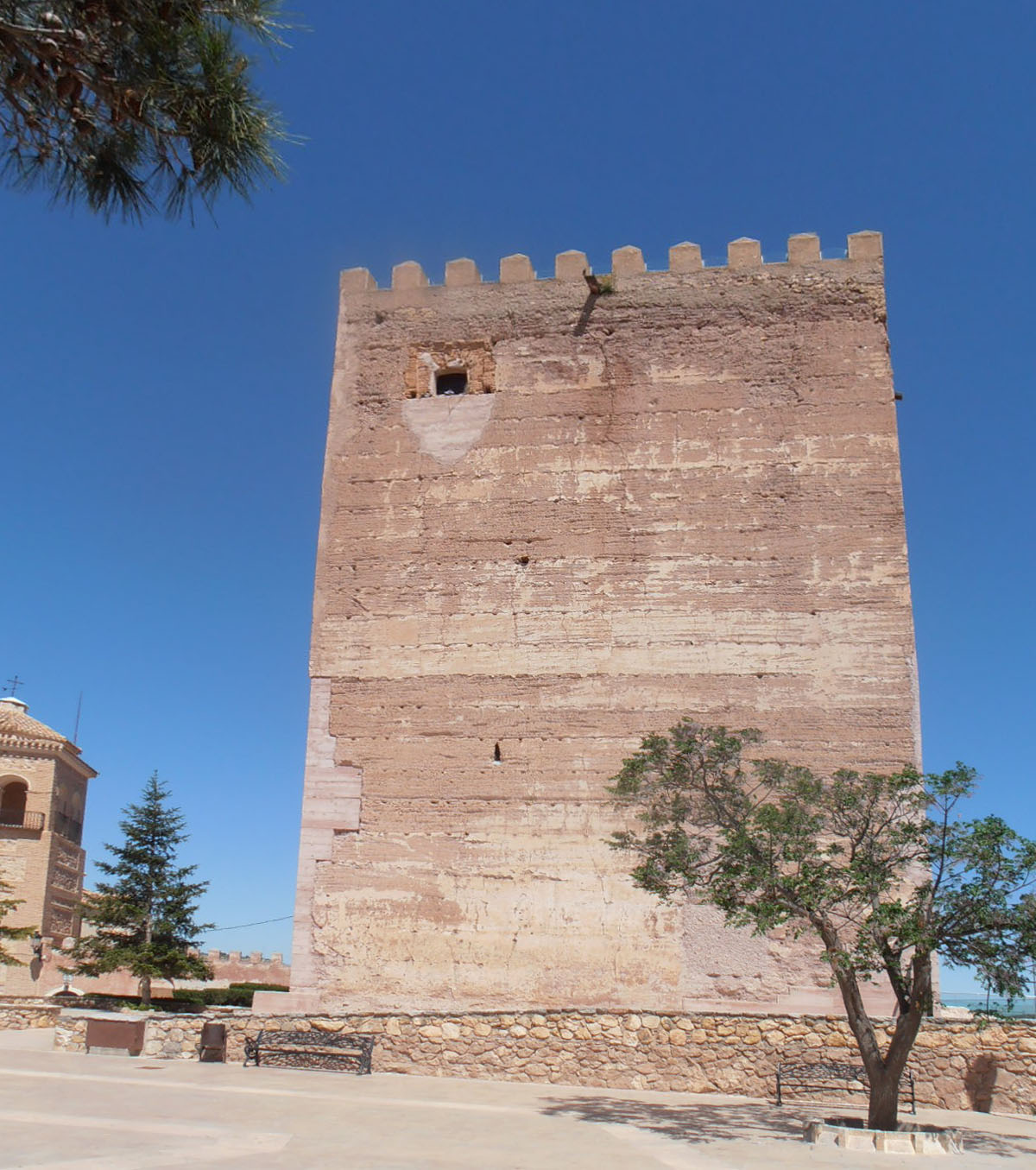 Aledo: Torre de Homenaje from West, with Iglesia Sta María la Real at the left